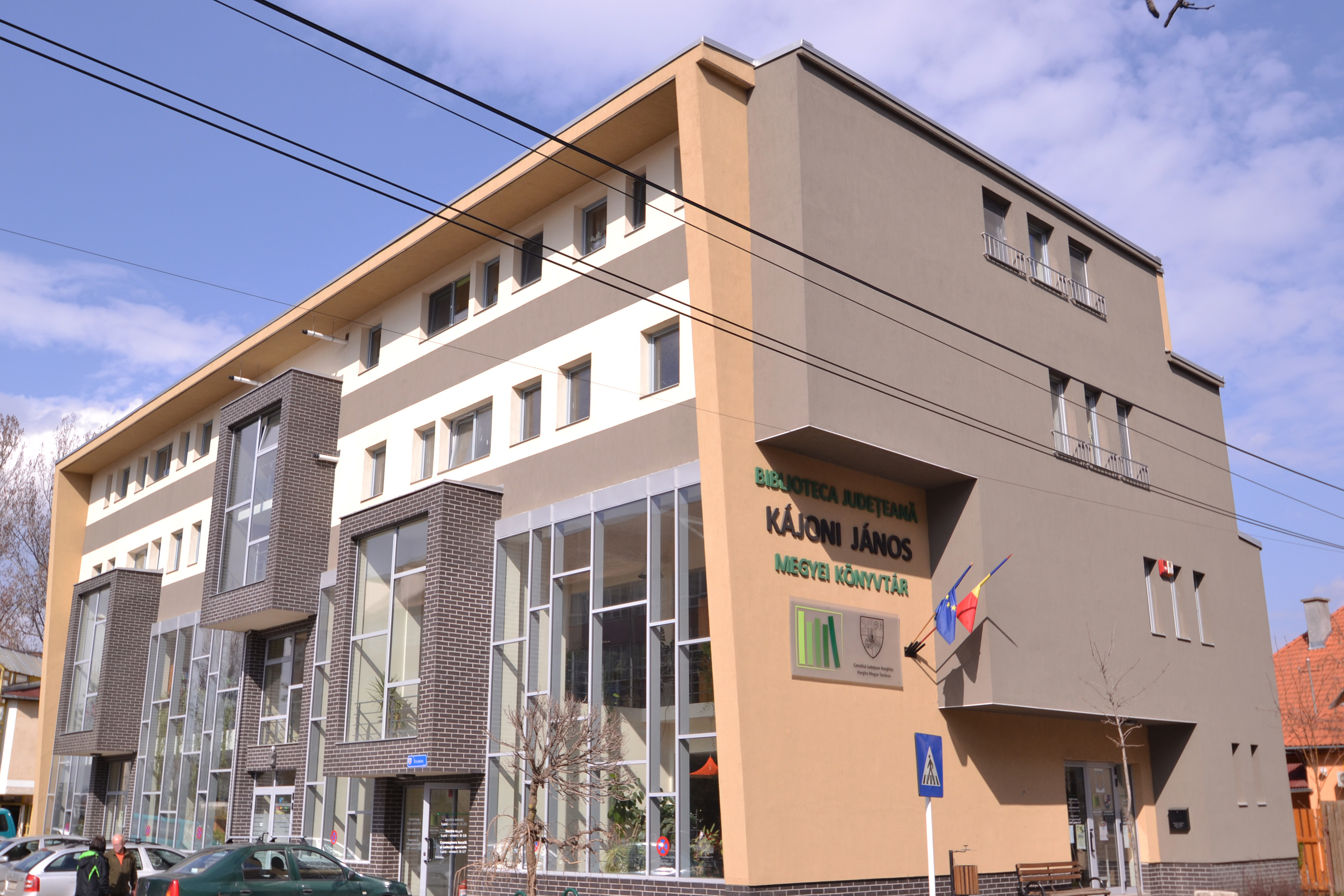 könyvtár